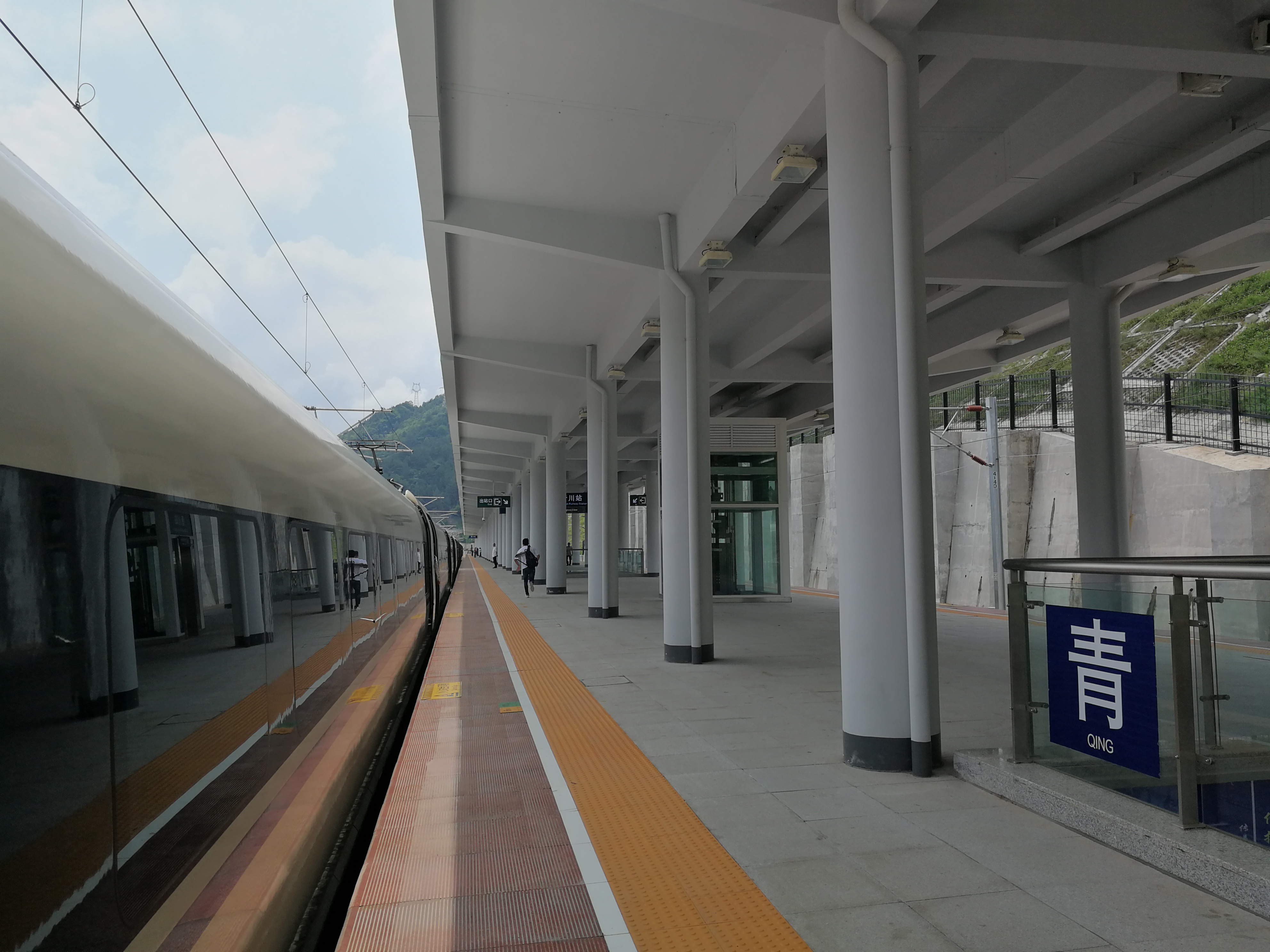 四川省广元市青川县金子山乡青川站